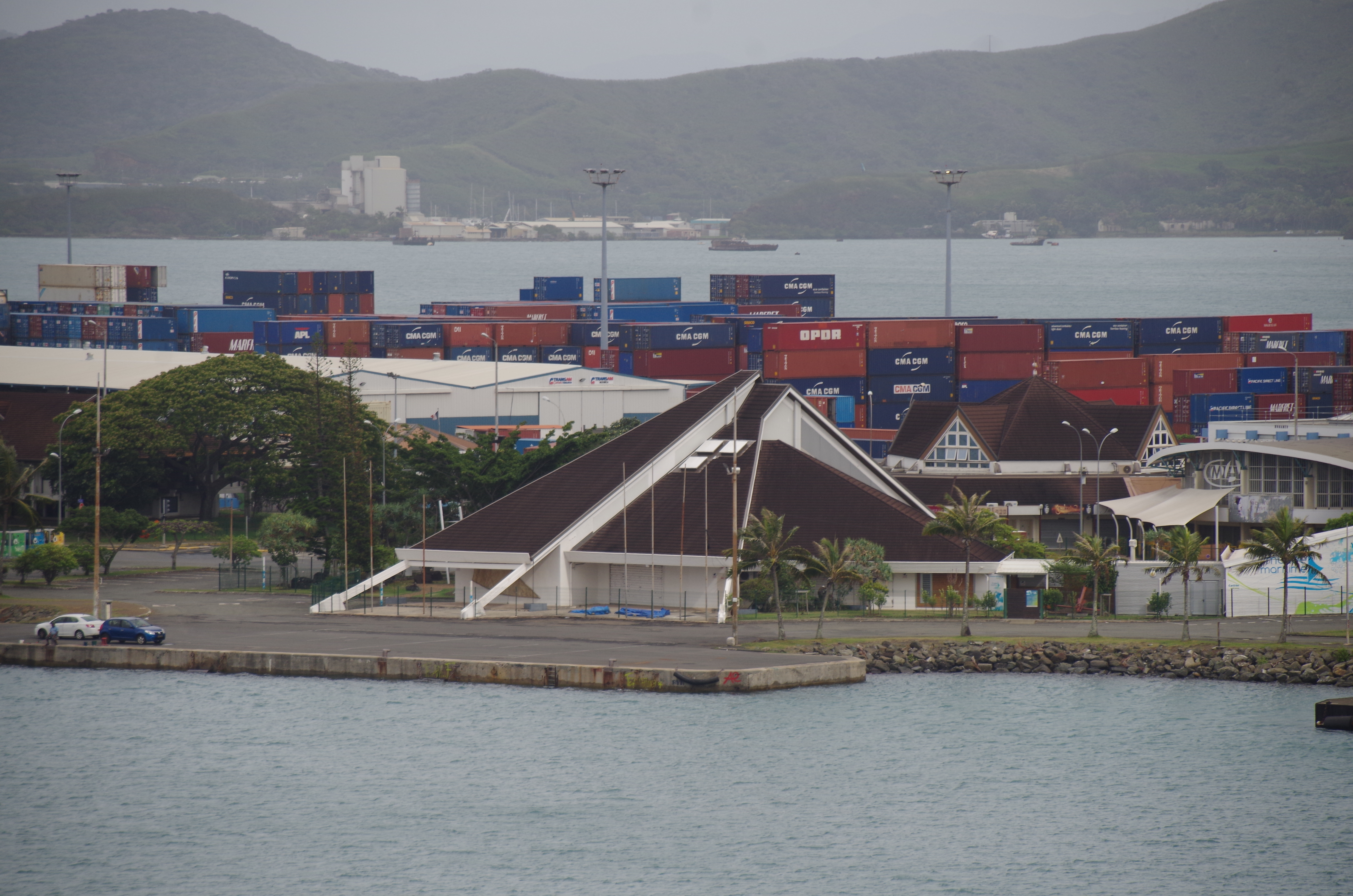 Nouméa Blick Hafen